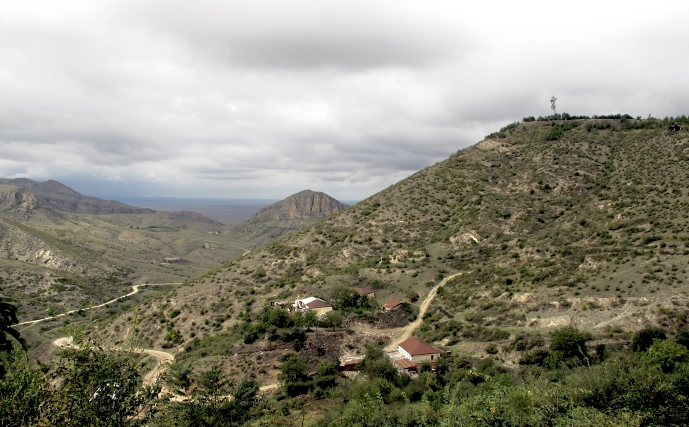 Вид на бердашенский музей (здание с гигантской статуей) и Кусаберд (Девичья крепость - арм.).